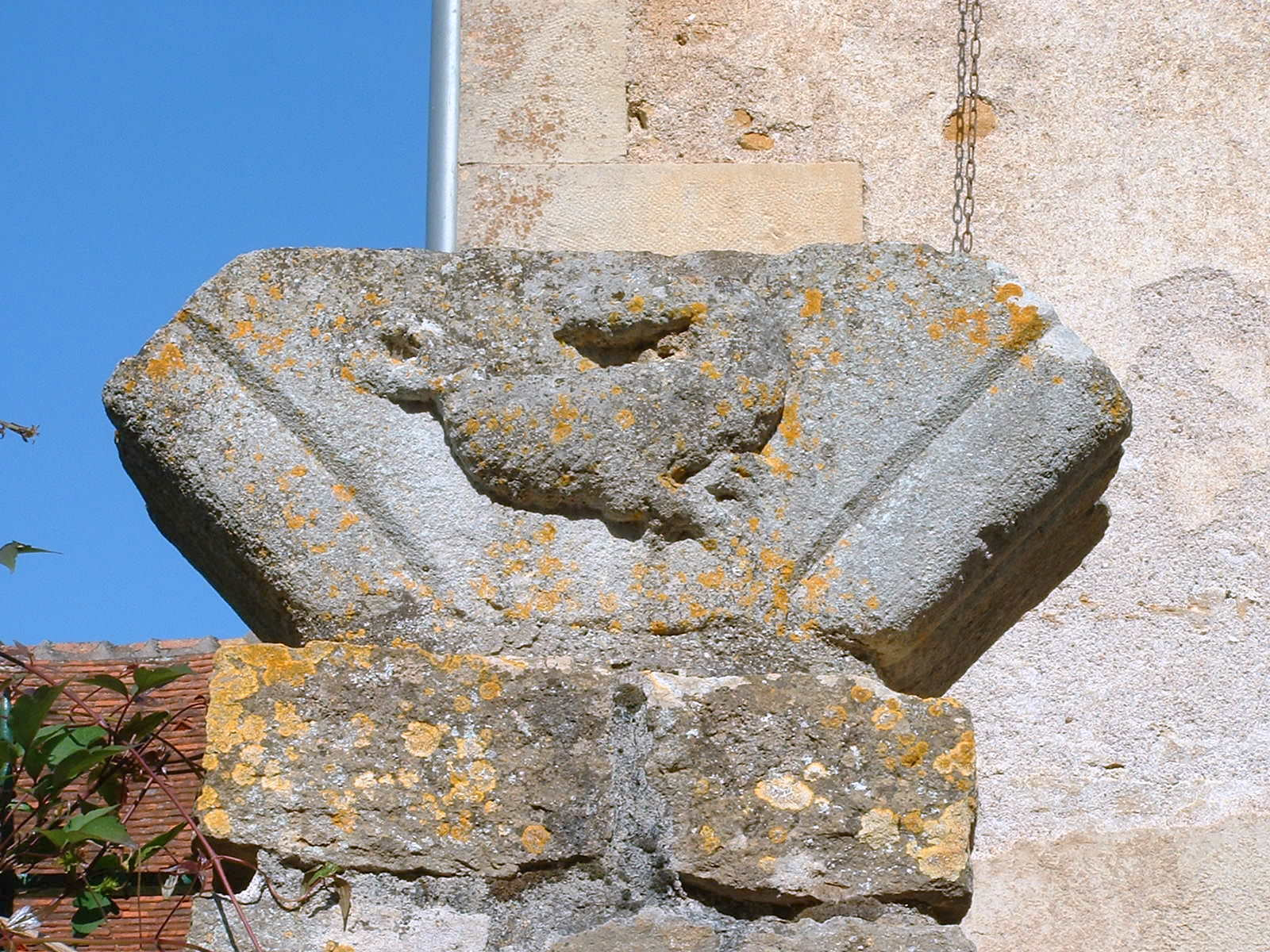 Montréal (Yonne) : pierre sculptée avec une salamandre, provenant de l'ancienne halle